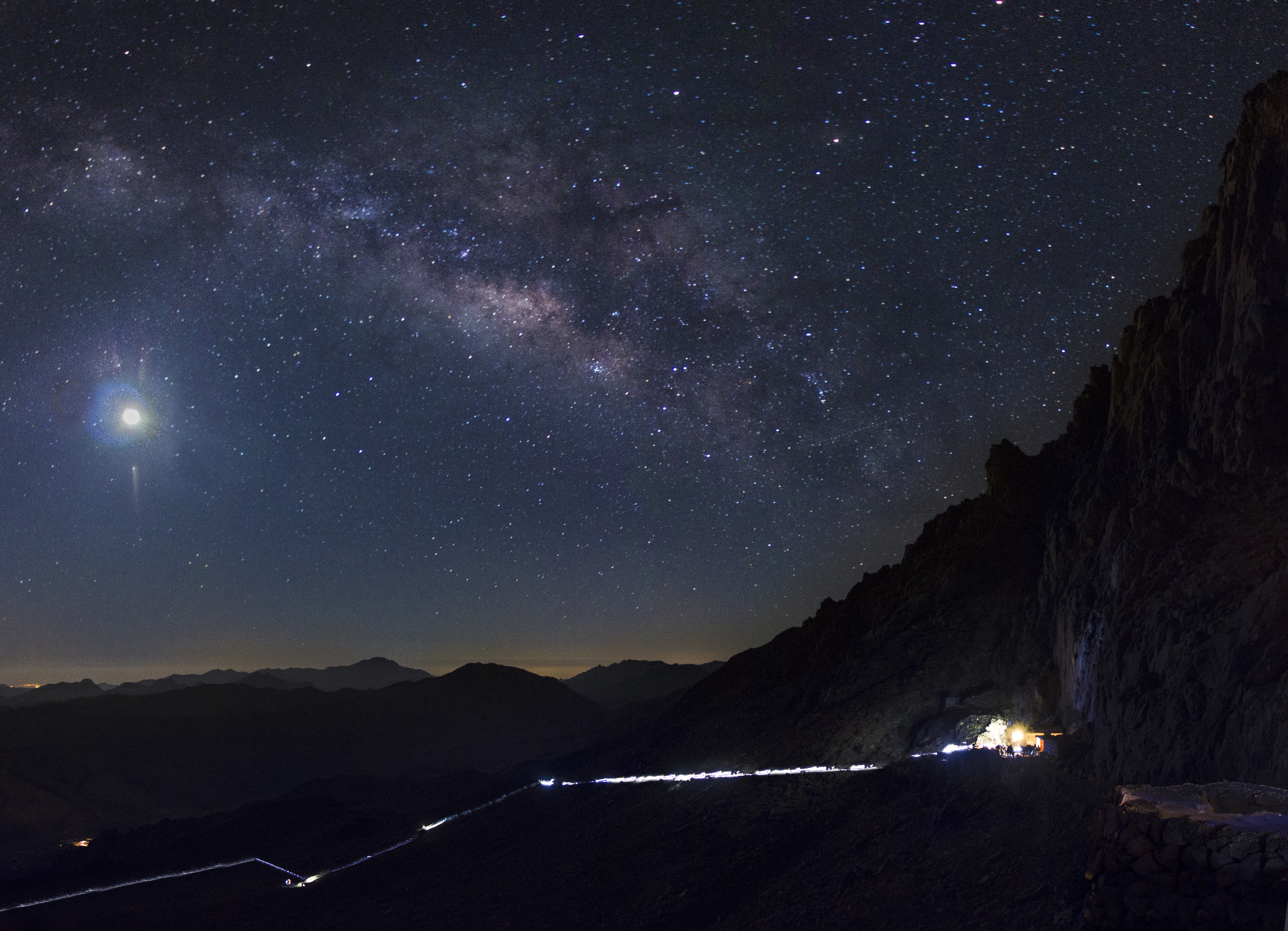 الصورة يظهر فيها ذراع المجرة ( مجرة درب التبانة التى نحن جزء منها ) في نفس وقت شروق القمر الصورة أثناء صعود جبل موسي - سيناء - مصر